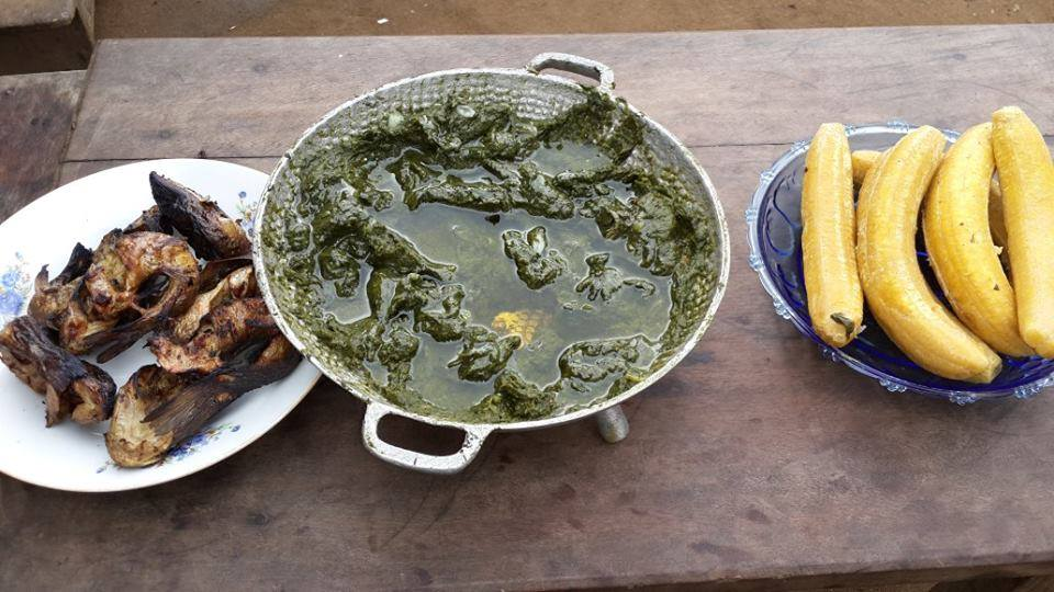 ragout de plantain aux feuilles de tarot accompagné de machoirons frais d'eaux douce braisé au feu de bois(plat en pays agni) This is an image of food from Ivory Coast